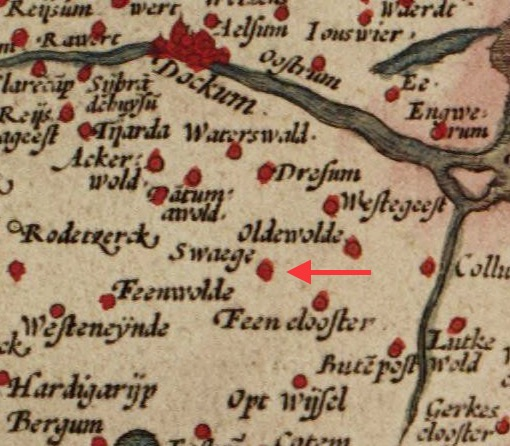 Detail van een kaart van Orthelius 1574